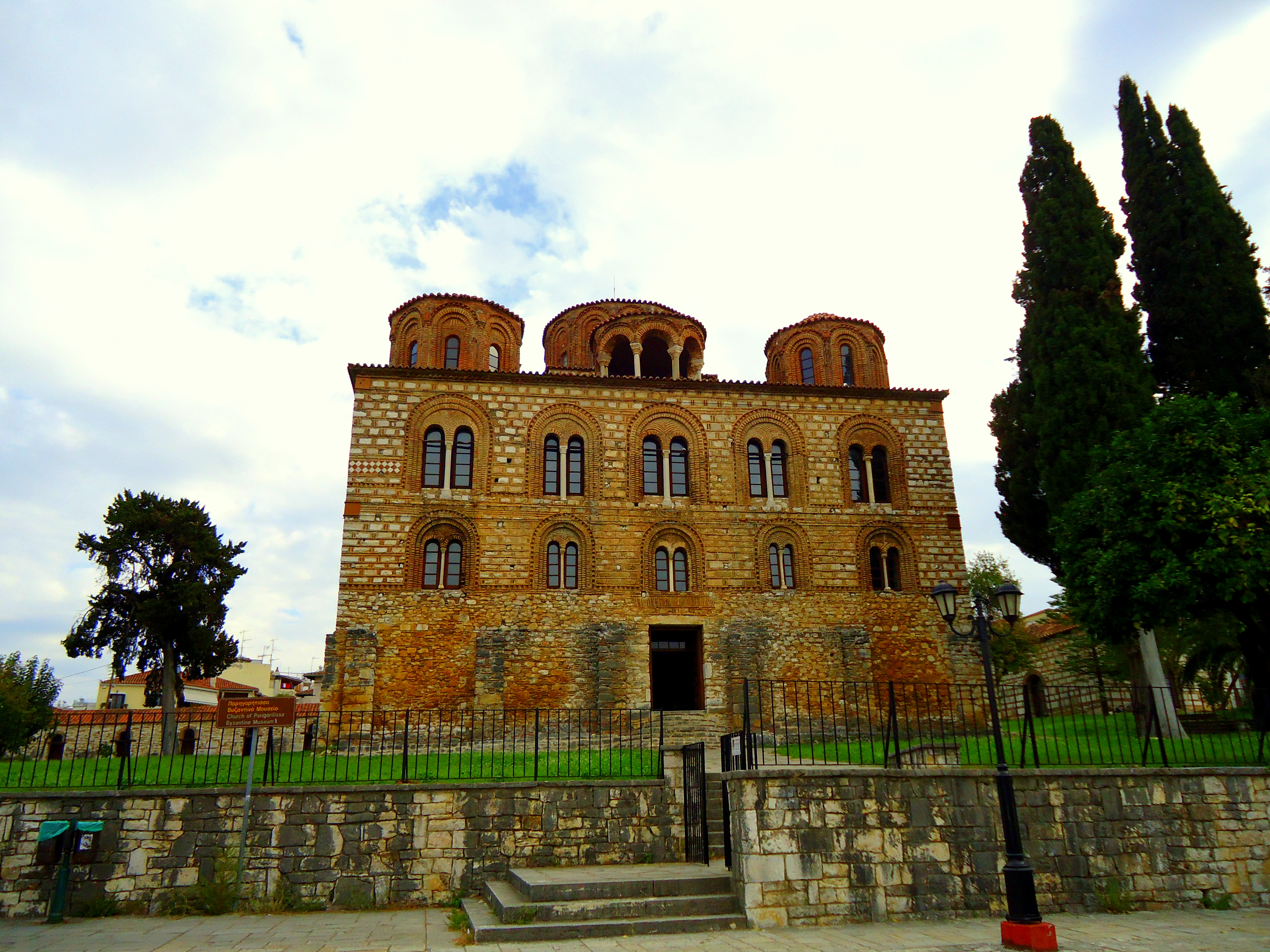 Ναός της Παρηγορήτισσας: Βυζαντινός ναός, ο οποίος βρίσκεται στη δυτική πλαγιά του λόφου Περάνθης. Θεμελιώθηκε το 1285 από τον Νικηφόρο Α' Κομνηνό Δούκα και τη γυναίκα του Άννα Παλαιολογίνα Κατακουζηνή. Σήμερα σώζονται ο ναός, η Τράπεζα και δεκαέξι κελιά. Ο σημερινός ναός είναι αξιοπρόσεκτος για την αρχιτεκτονική του, τη διακοσμησή του αλλά και τις τεράστιες διαστάσεις. Ο ναός εμφανίζει μήκος δυτικής πλευράς 22,10μ., μήκος πλάγιων πλευρών 20,27μ, ύψος 20,28μ, εξωτερική διάμετρος κεντρικού τρούλλου 7,58μ και ύψος τρούλλου 3,50μ.